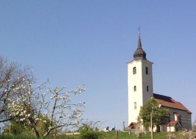 SzalatnyaSlovenčina: Slatina, okres Levice